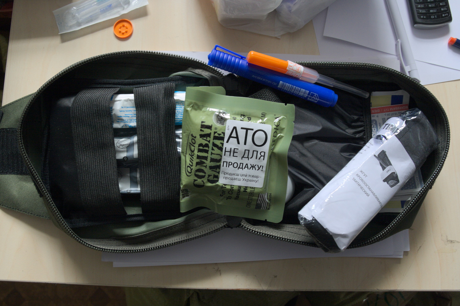 Аптечка виробництва волонтерської організації Народний тил